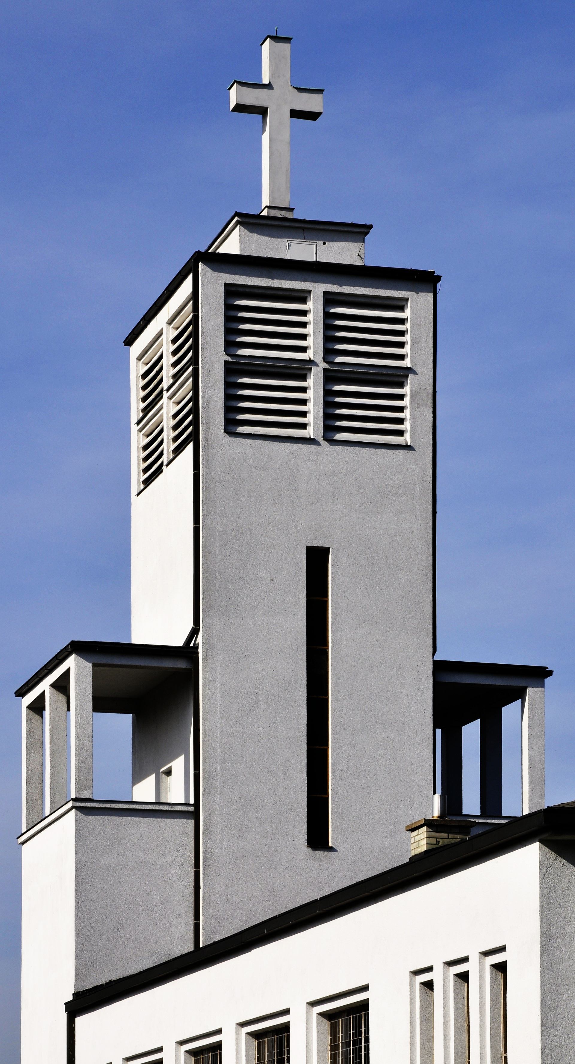 Kostel svaté Anežky České (Záběhlice), Praha 4-Záběhlice, Roztylské sady 2500, Spořilov.